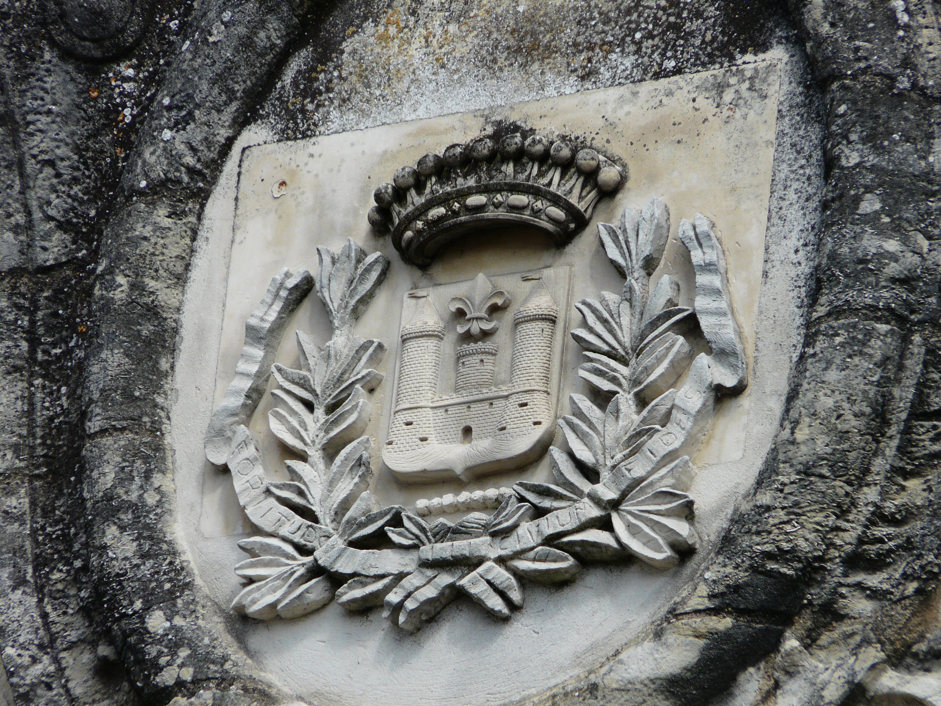 Blason de la ville de Périgueux sur le portail de la résidence des Cordeliers, rue des Thermes, Périgueux, Dordogne, France.